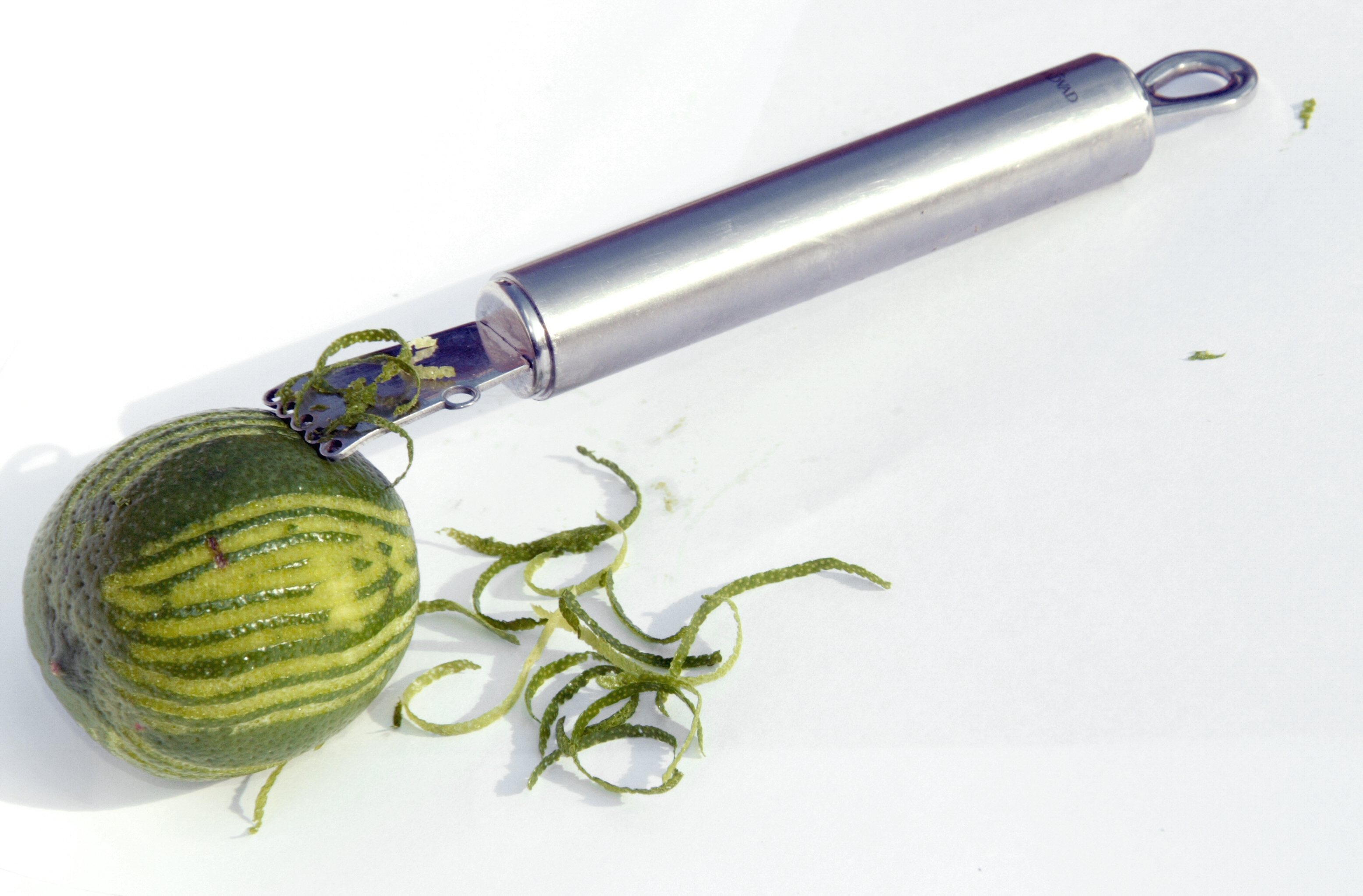 Juliennejern og limefrugt